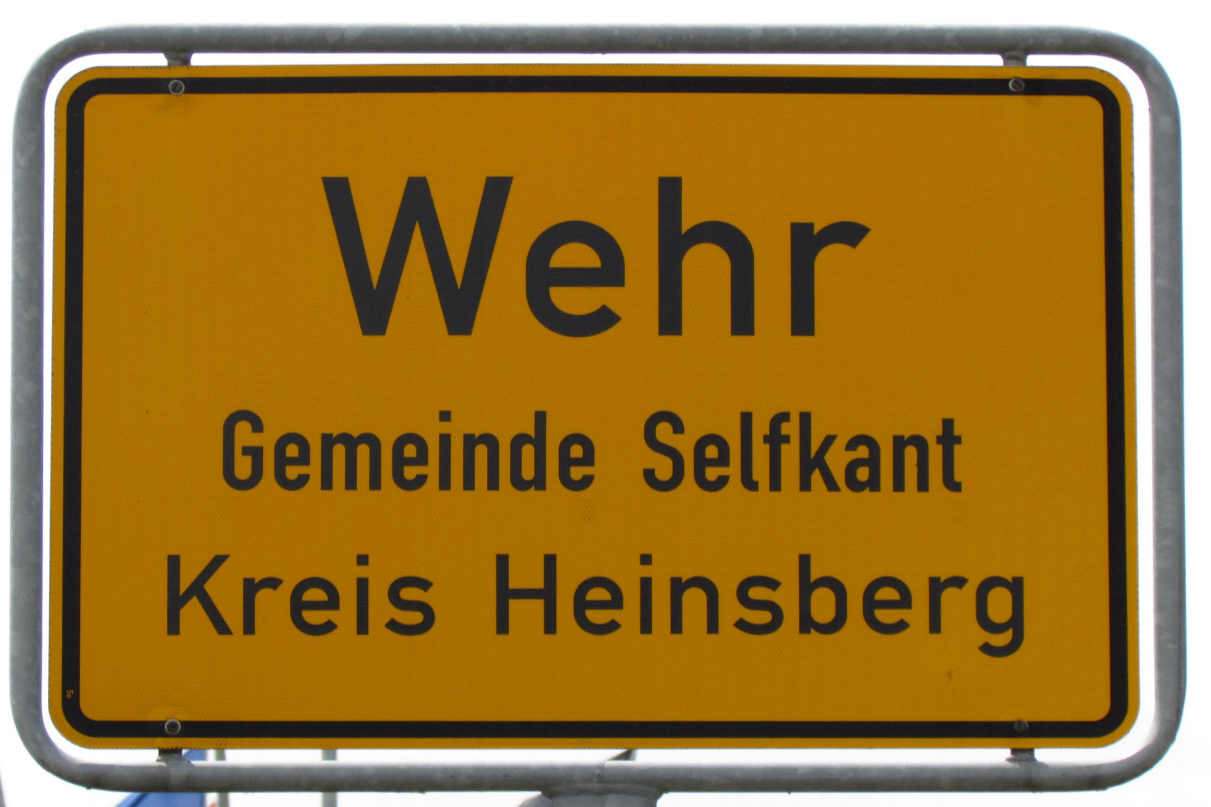 Wehr Ortsschild